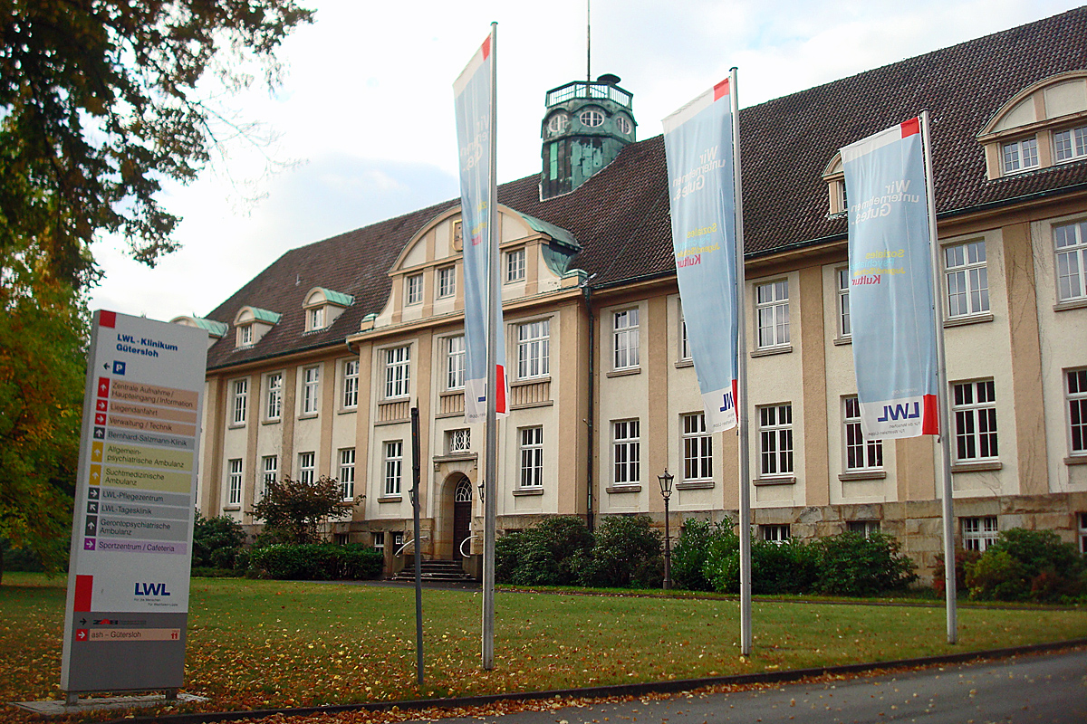 LWL-Klinikum Gütersloh, Haupteingang Hermann-Simon-Straße